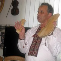 На виготовлення кожної скрипки у майстра йде понад півроку